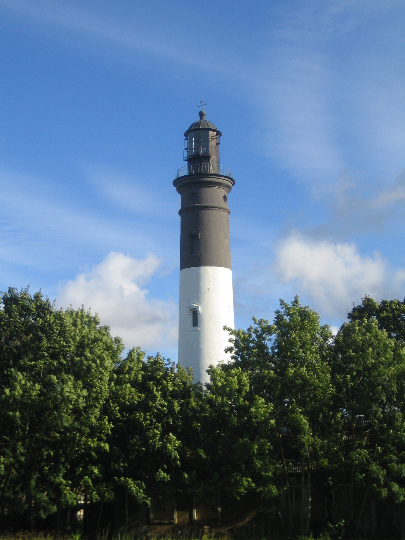 Tallinna Lõuna tuletorn ehk nn Punane majakas, 1896 .a.